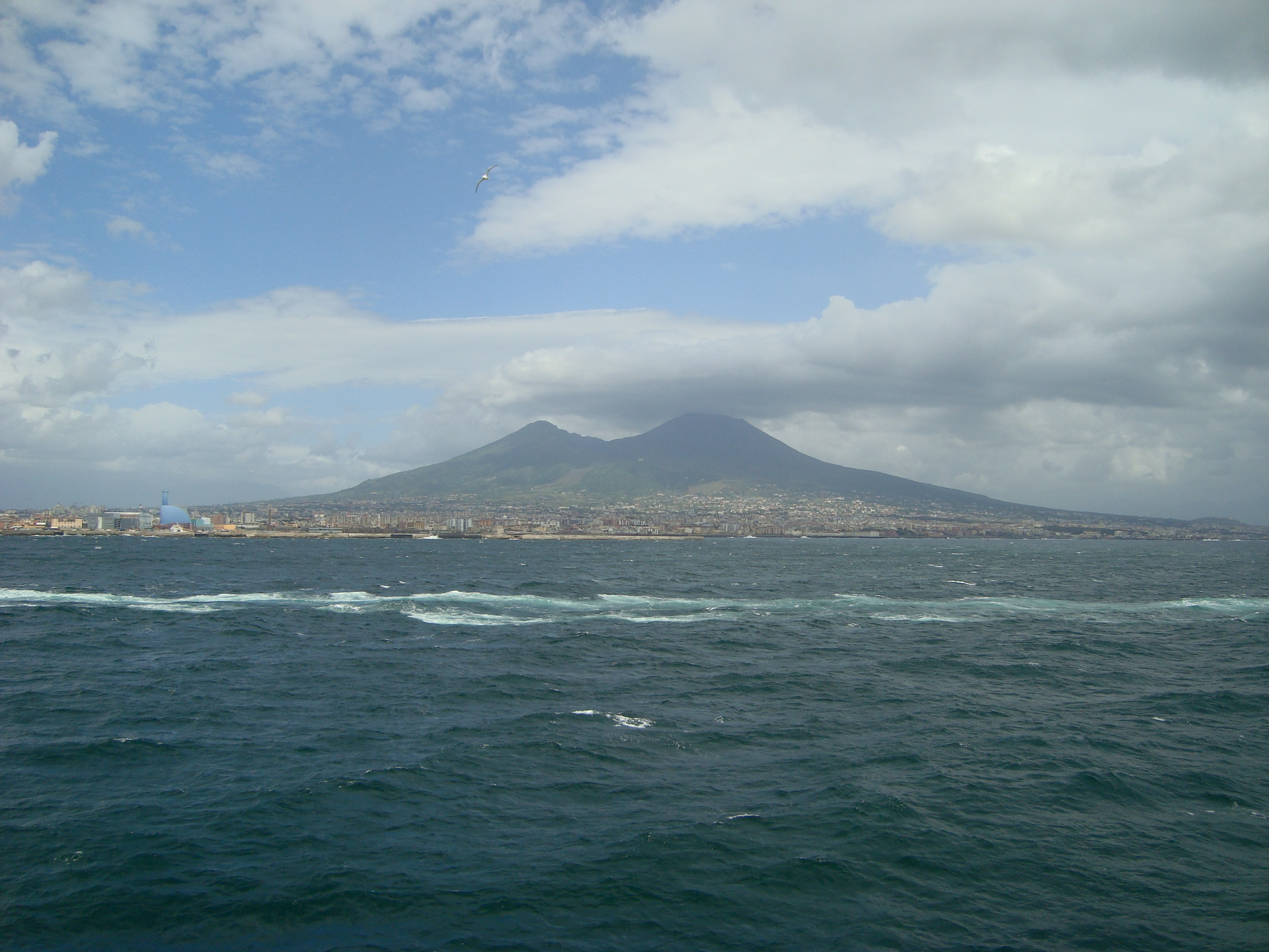 Vesuvio